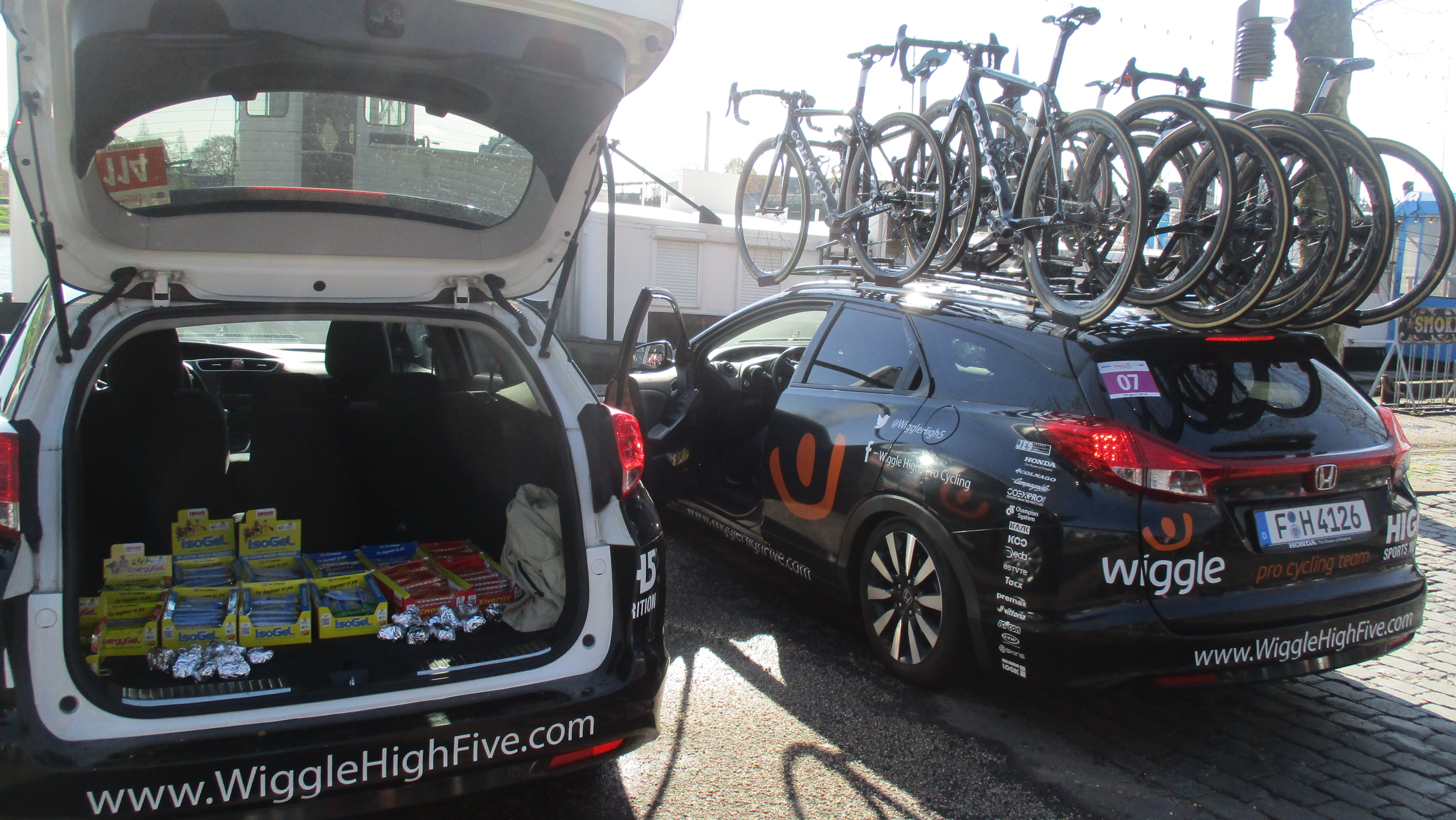 Start van de Amstel Gold Race Ladies Edition 2018 in Maastricht.